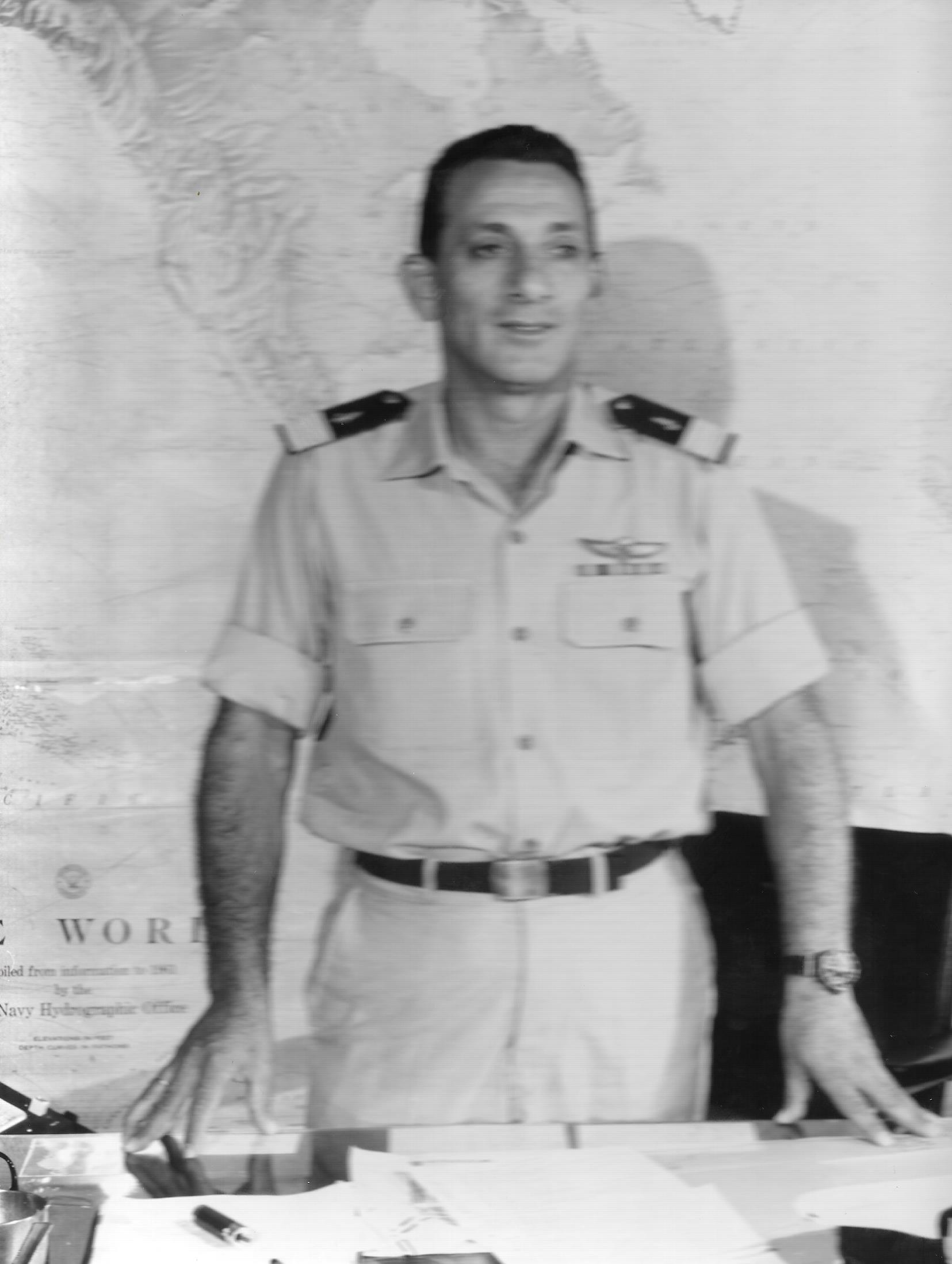 מפקד חיל הים אלוף [שלמה אראל במשרדו